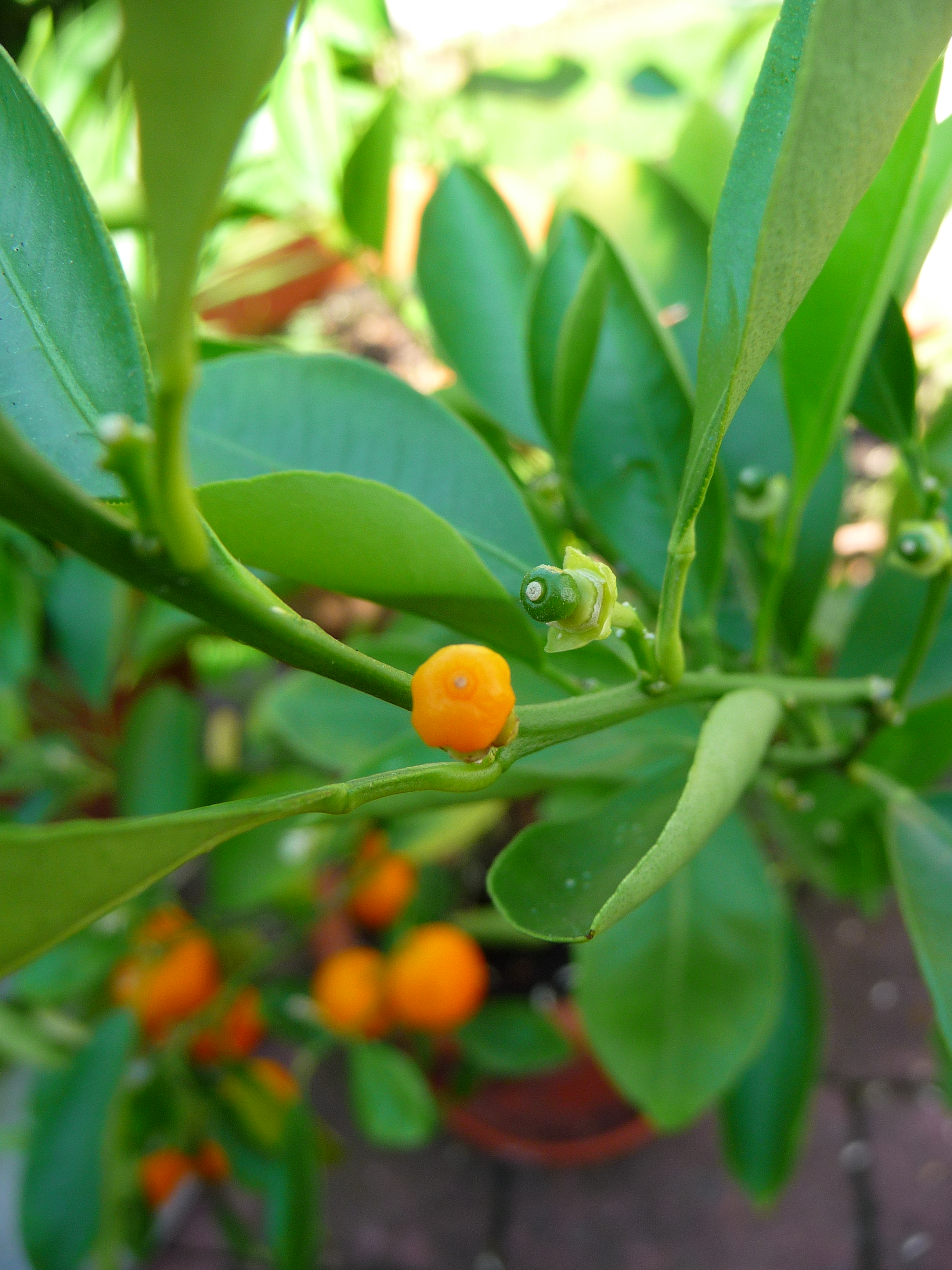 Fruchtansatz einer Mandarine (Citrus reticulata), fotografiert in Heidelberg (Baden-Württemberg, Deutschland)